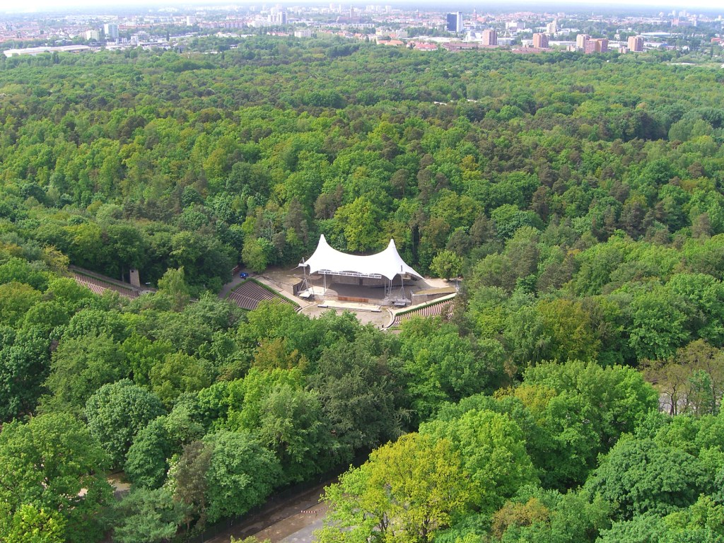 'Waldbuehne' in Berlin